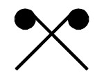 Taktisches Zeichen für den ABC-Schutz im Katastrophenschutz.